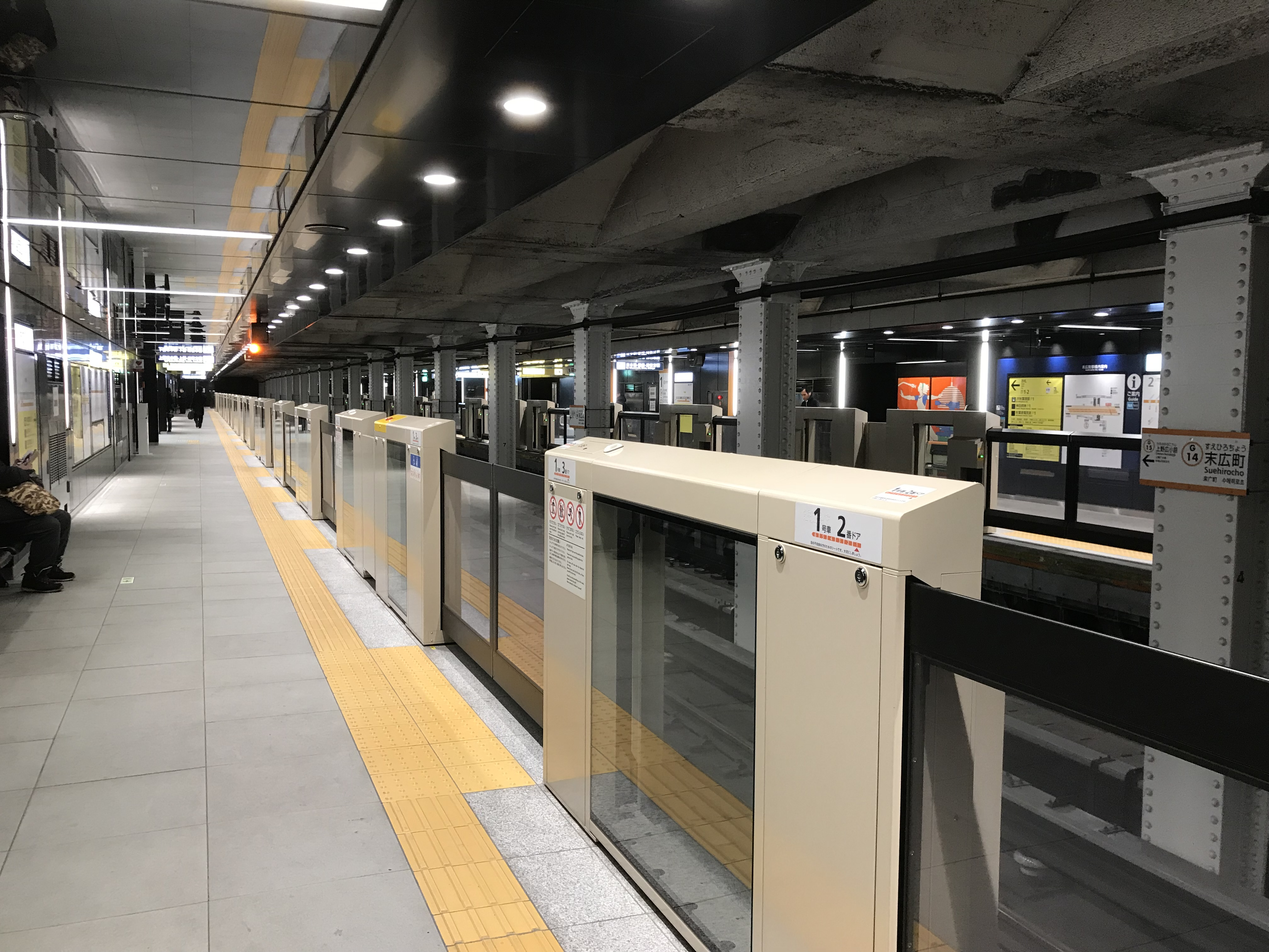 リニューアル後の末広町駅のホーム